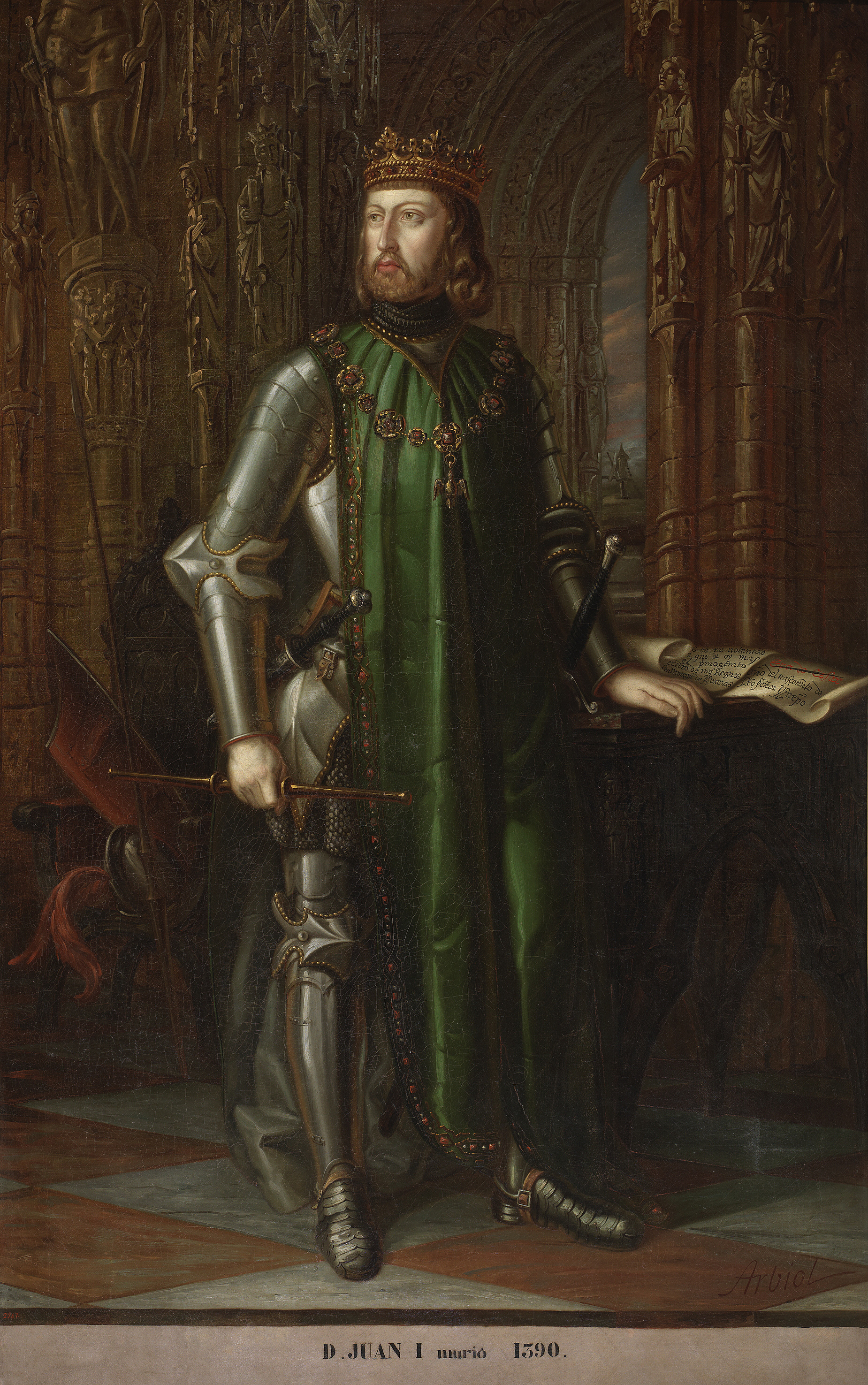 El lienzo representa al rey Juan I de Castilla (1358-1390). Fue hijo del rey Enrique II de Castilla y de la reina Juana Manuel de Villena, hija del célebre Don Juan Manuel. Intentó spoderarse del reino de Portugal pero fue aplastantemente derrotado en el sitio de Lisboa de 1384 y en la batalla de Aljubarrota, librada en 1385. Falleció en 1390 en Alcalá de Henares, a los 32 años de edad y fue sucedido en el trono por su hijo, Enrique III de Castilla.